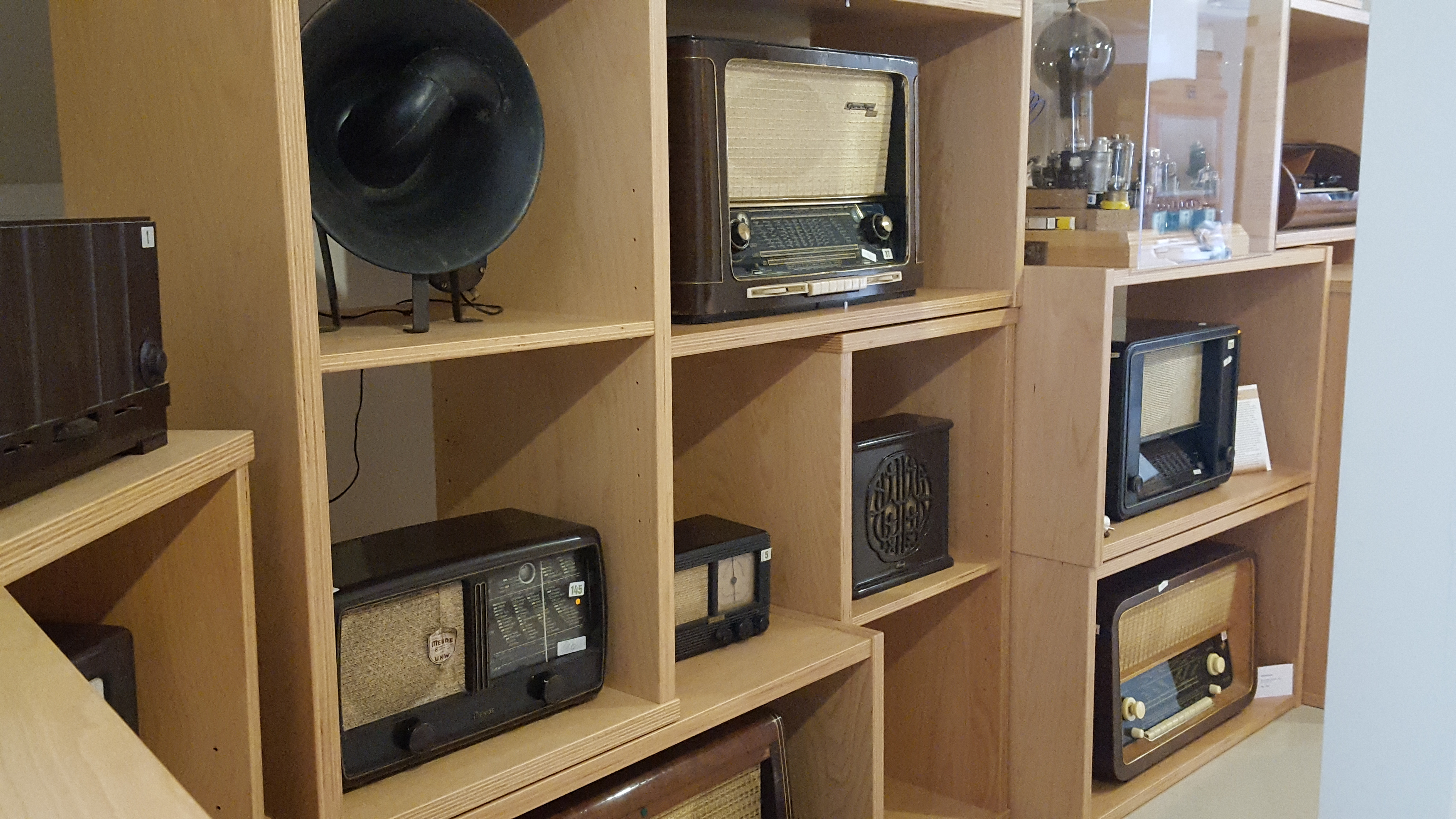 Historische Rundfunkempfänger im Konrad-Zuse-Museum Hünfeld mit Stadt- und Kreisgeschichte